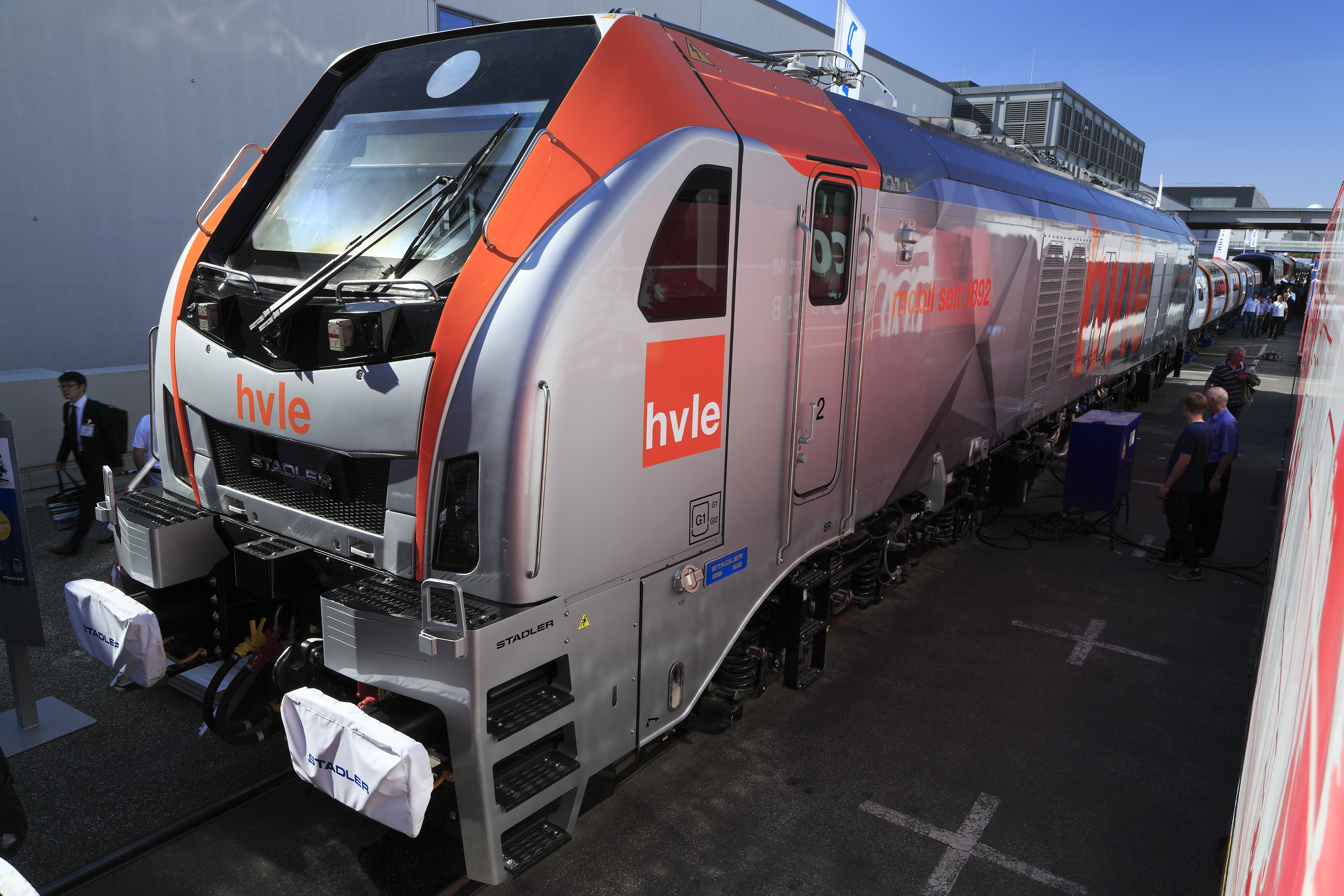 sechsachsige Stadler-Zweikraftlokomotive mit 7000 kW bei 15 oder 25 kV Fahrdrahtspannung und 2800 kW im Dieselbetrieb. Die Maschine ist mit nur 120 km/h zulässiger Geschwindigkeit und ohne Heizanschlüsse nur für den Güterverkehr ausgelegt, doch Teil eines flexiblen Baukastensystems.